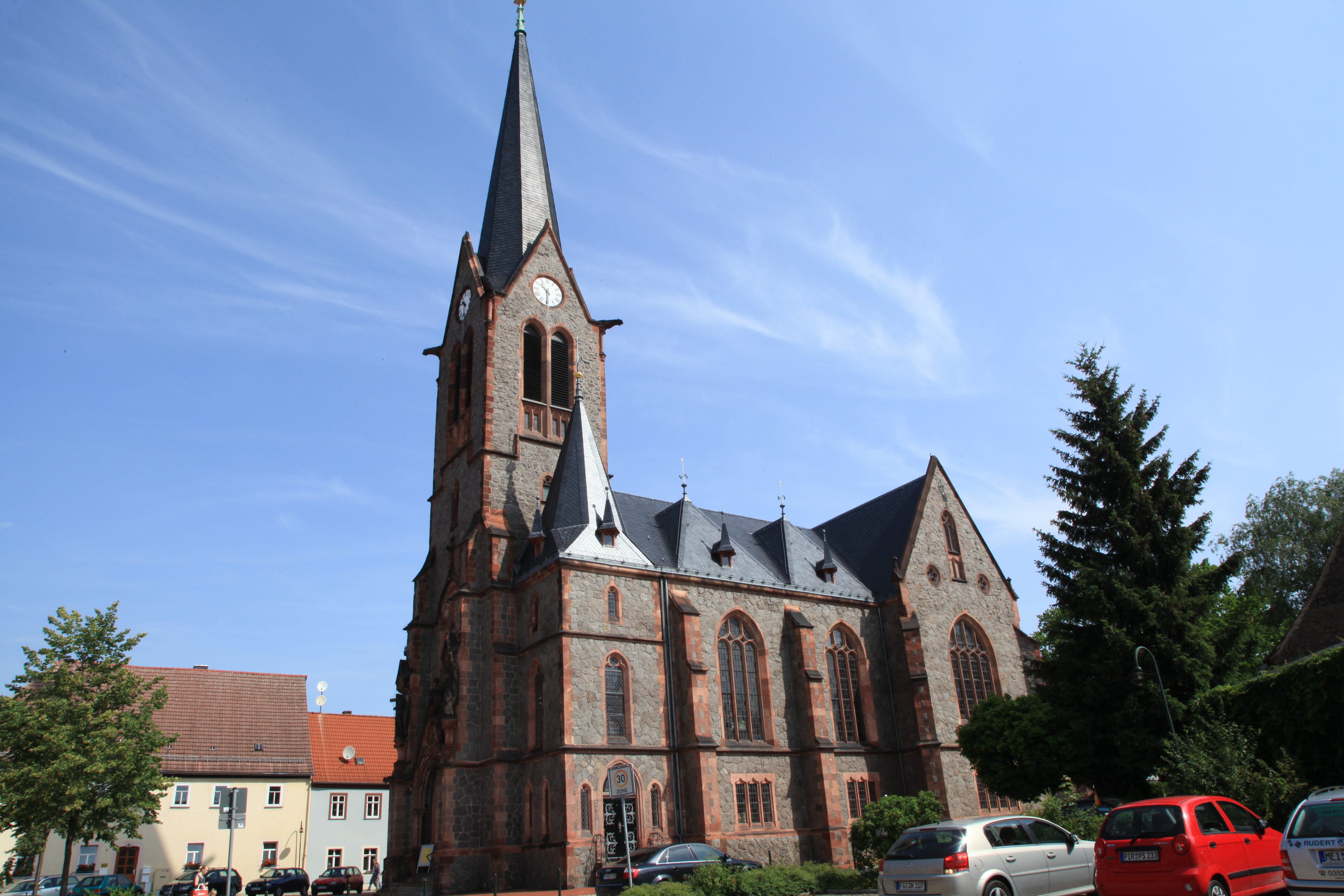 Nikolaikirche, Meißner Straße in Wilsdruff